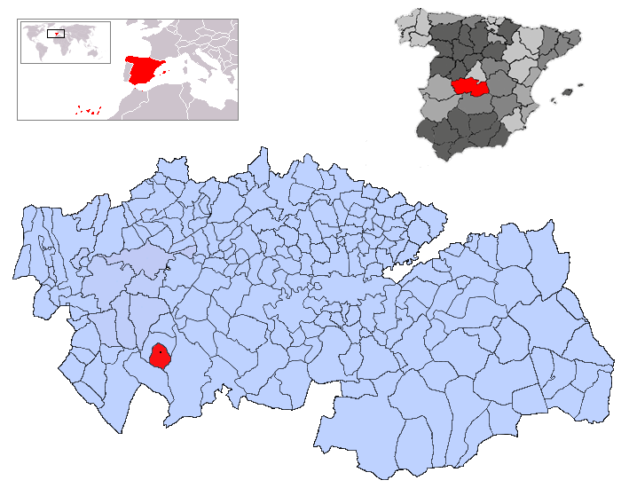 Espinoso del Rey en la provincia de Toledo